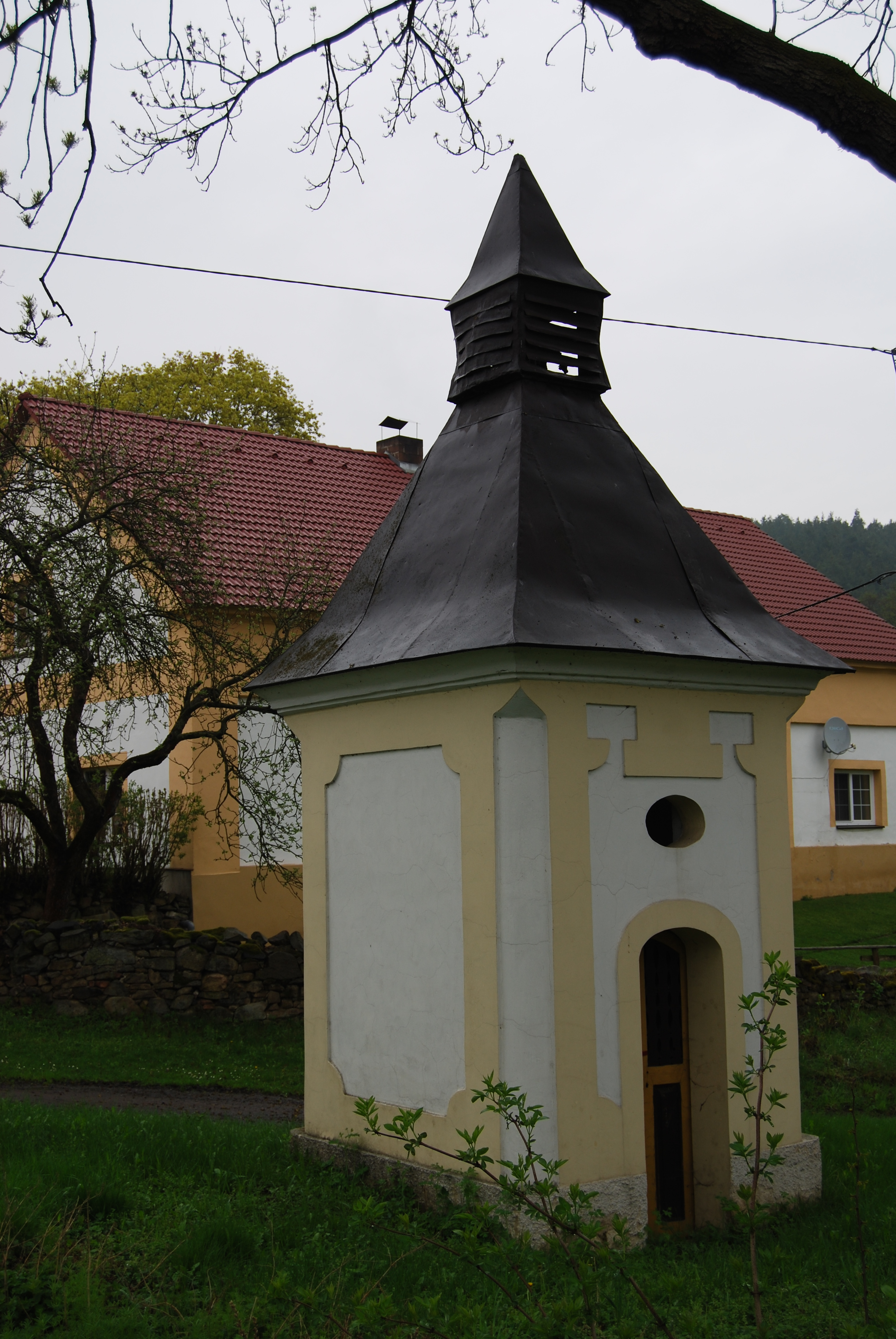 Kaple v osadě. Jablonce (dříve též Jablonec) je osada, část obce Nečín v okrese Příbram. Česká republika. - Google Maps - Google Earth